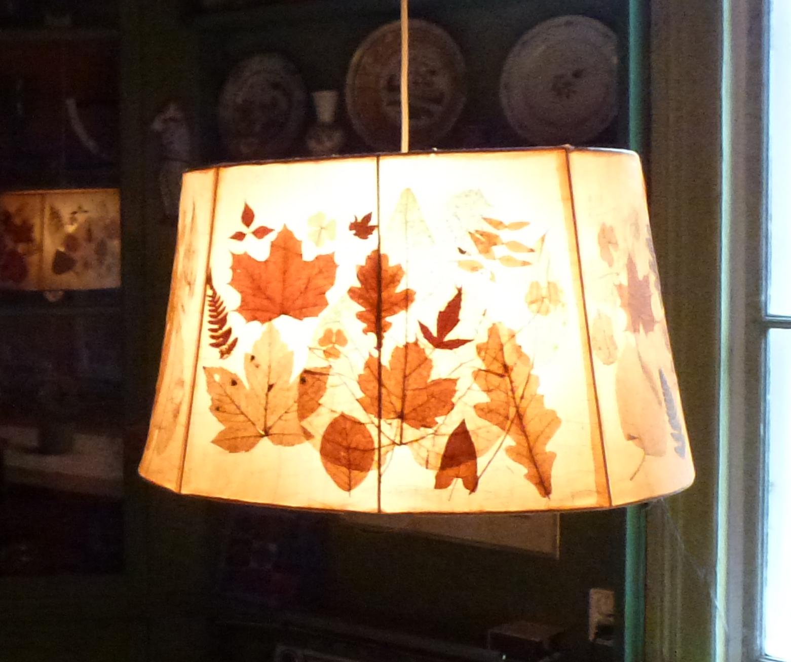 Lampskärmen Puck gjord av Birgitta på 60-talet